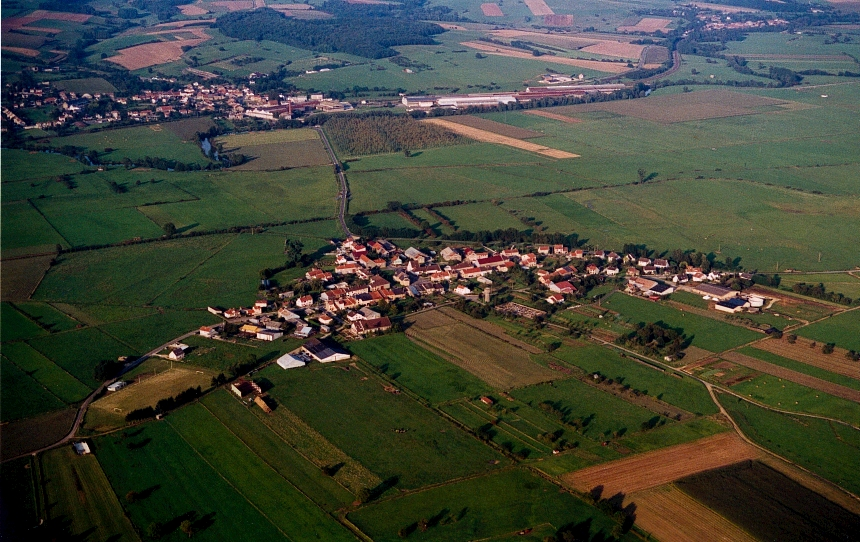 Sailly vue du ciel